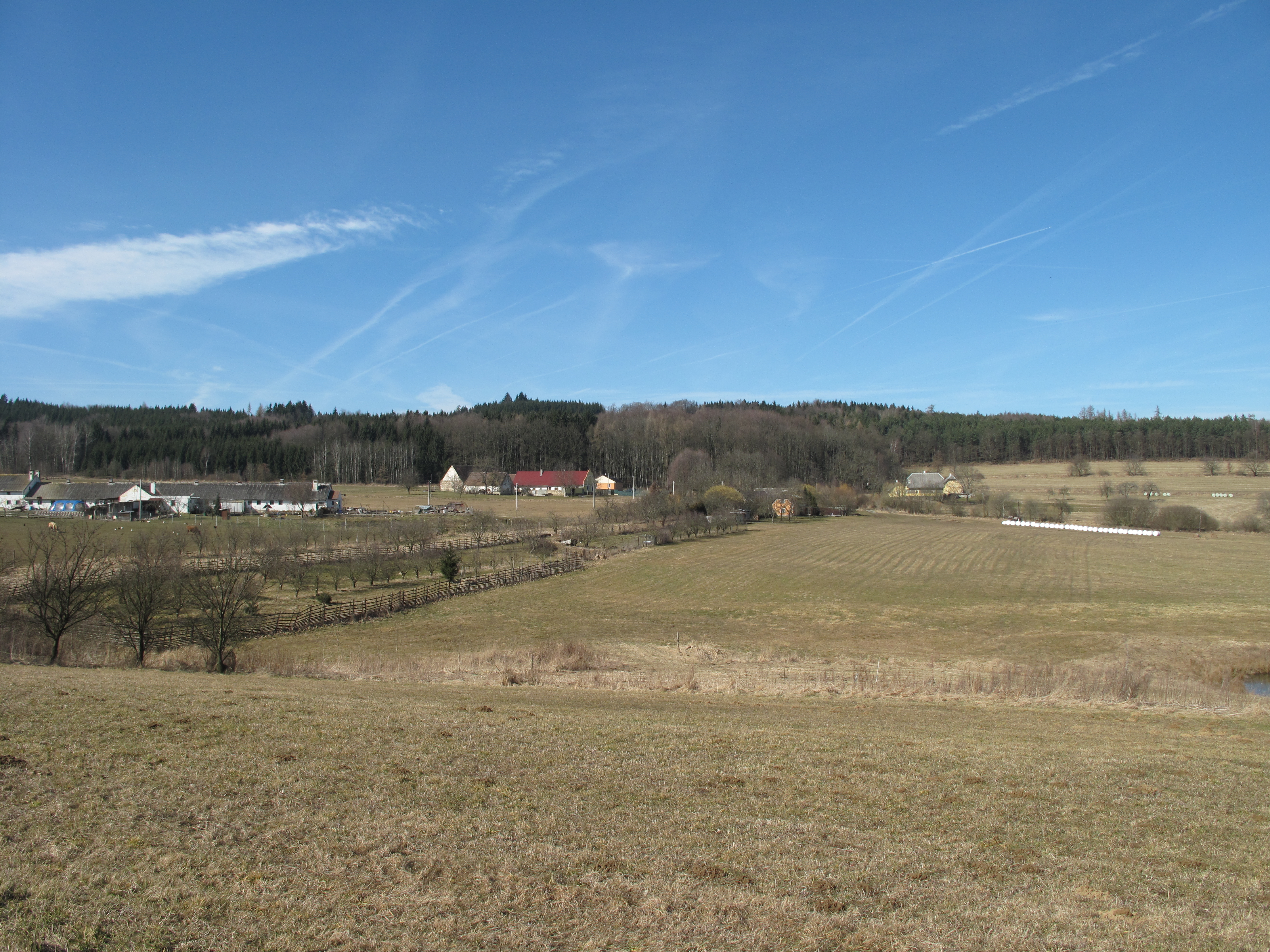 Krajina v Dlouhé Vsi. Okres Strakonice, Česká republika.